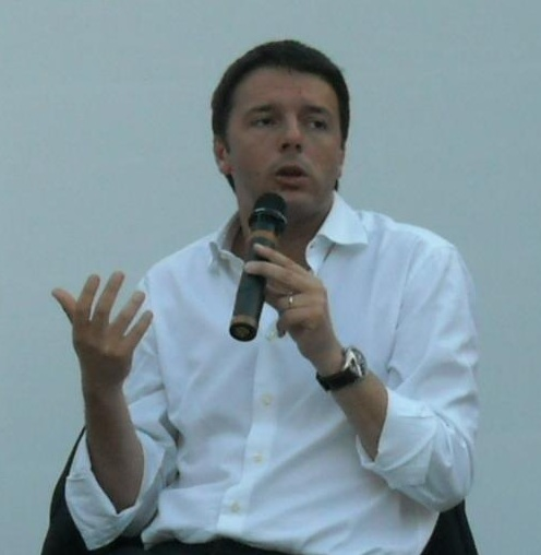 Matteo Renzi, Partito Democratico. 2012